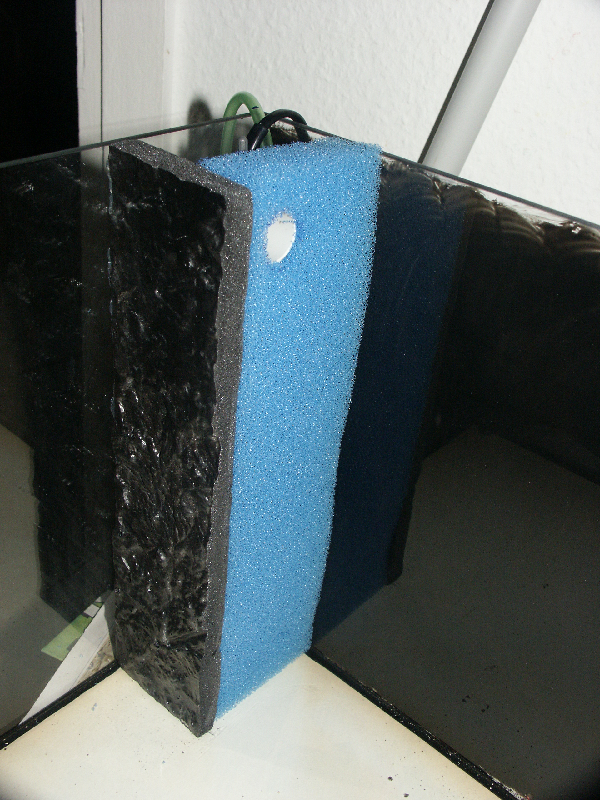 HMF Filter